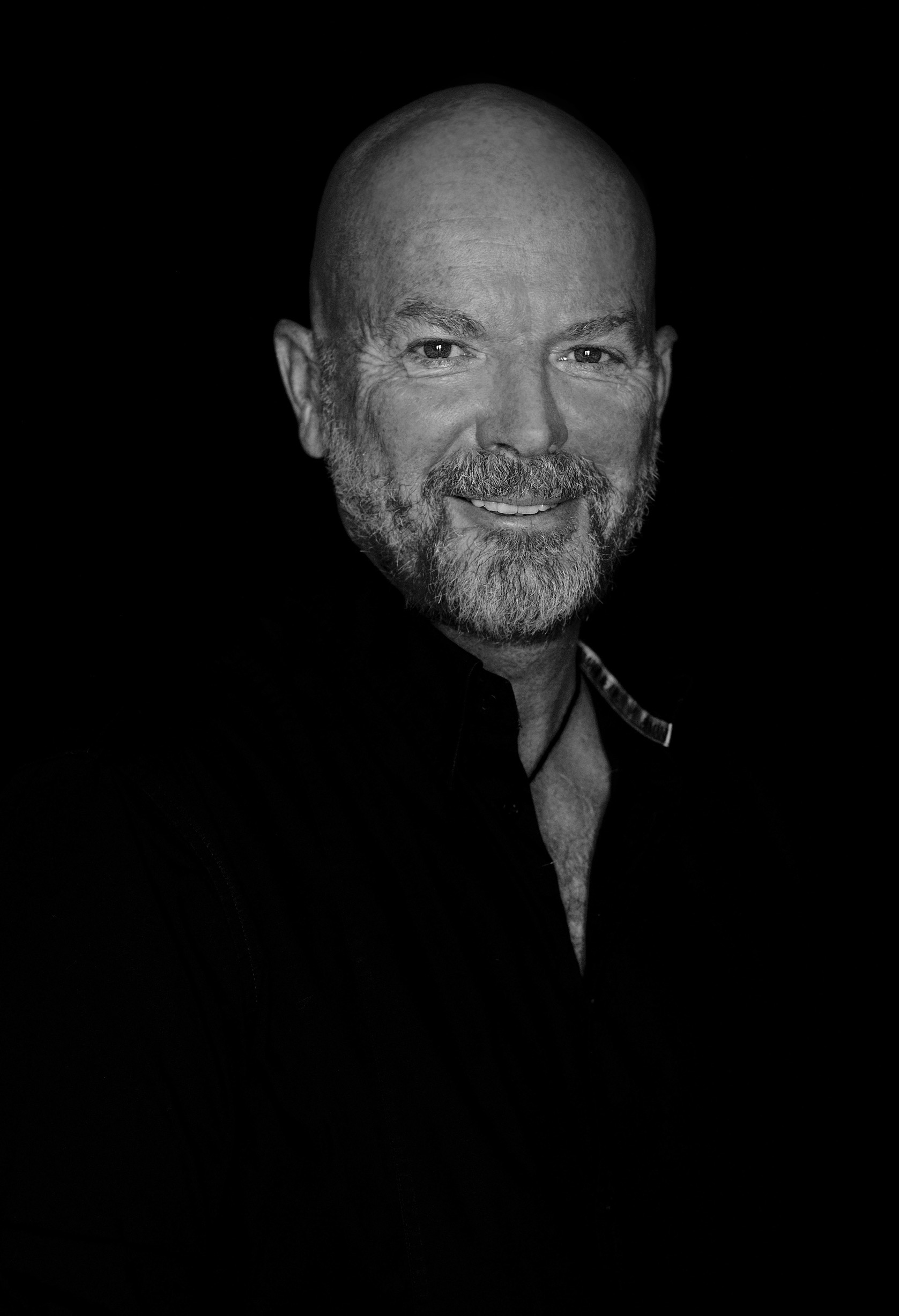 Fotografie vznikla na objednávku Divadla Kalich, je tedy vyxkonavatelem majetkových práv a souhlasí se zveřejněním.